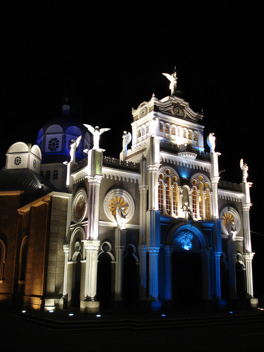 Basílica de Los Ángeles (1912-1929), Cartago - Costa Rica